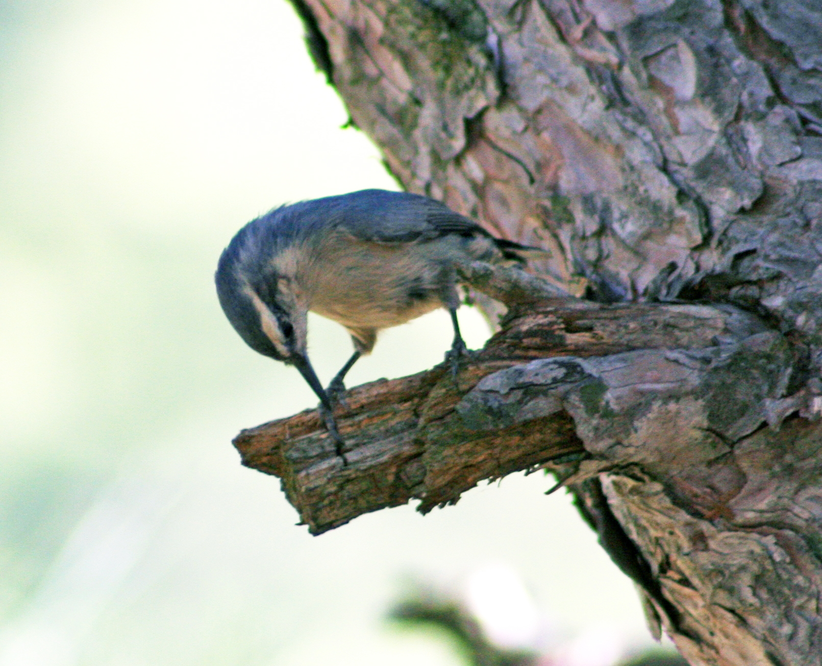 Una espècie endèmica de Còrsega, el Pica-soques cors. A la Vall de Restonica, aprop de Corte (Còrsega). En cors l'anomenen Furmicula, Pichja sorda, pichjarina i capinera. Female individual.